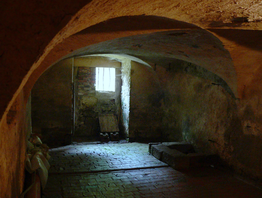 Keller der Fayence-Manufaktur Wrisbergholzen am Tag des offenen Denkmals 2011